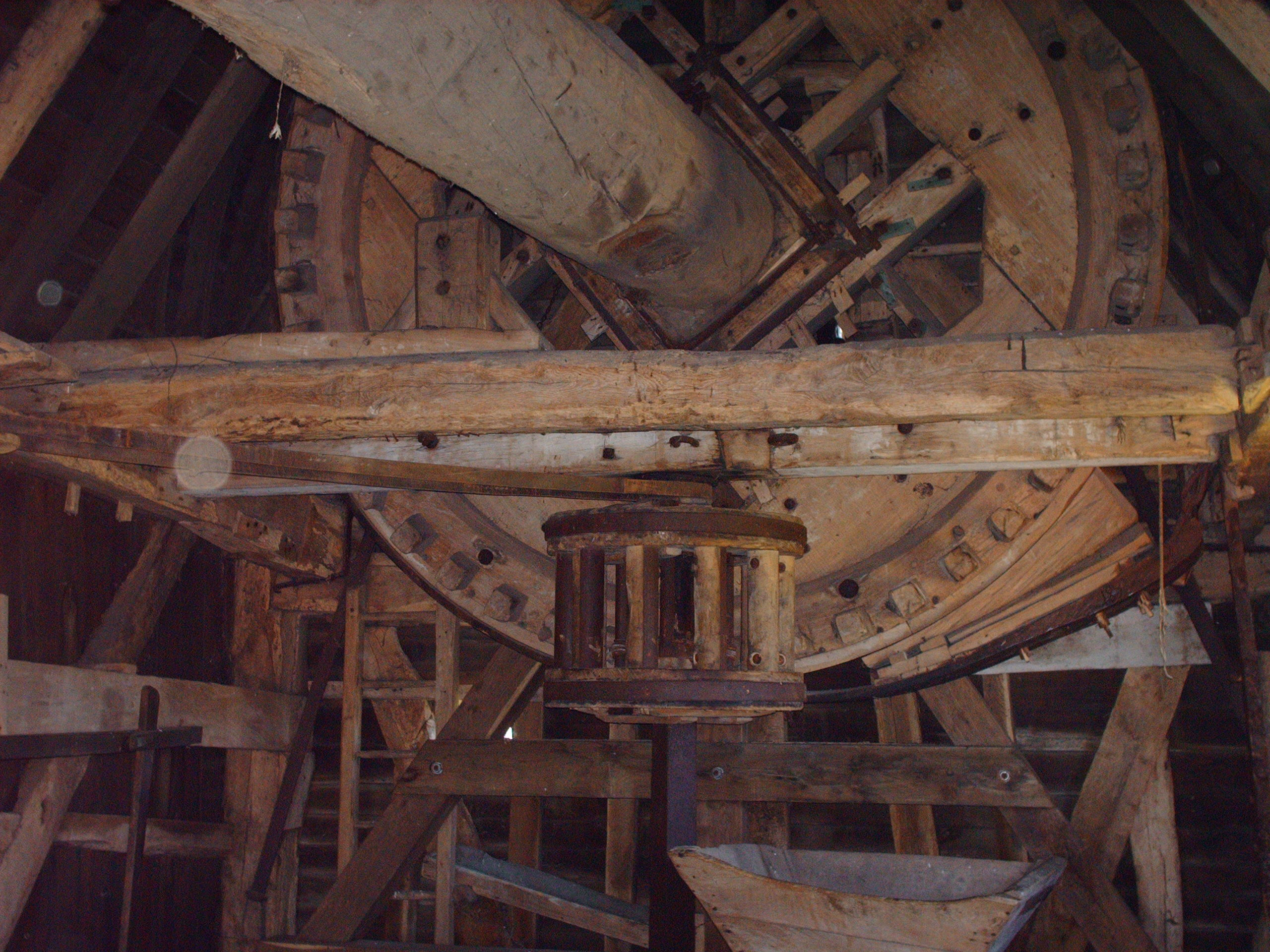 L'intérieur du moulin au premier étage, moulin de Saint-Maxent, Somme, France.